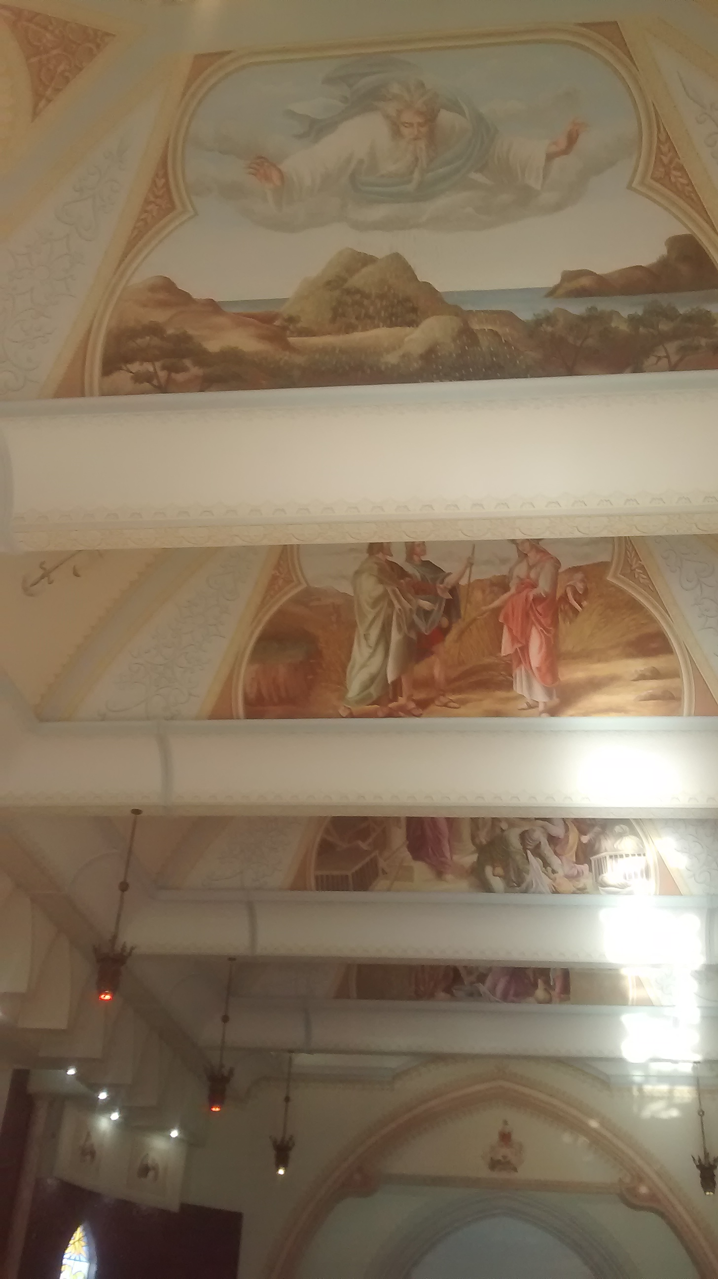 Visão interna da catedral de Ametista do Sul